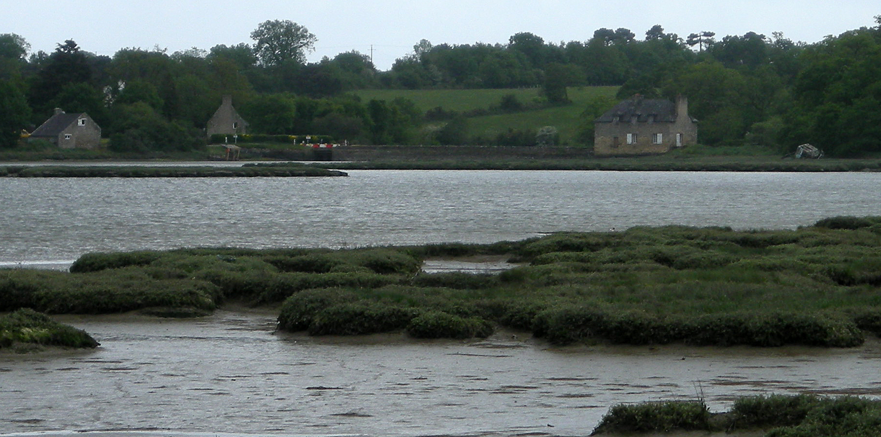 Le moulin de Kervilio vu de la rive droite de la rivière du Bono